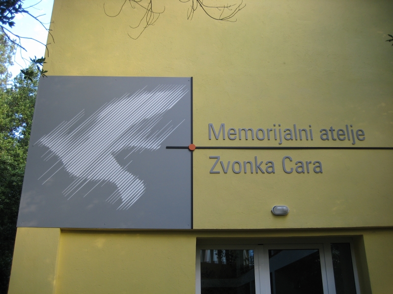 Memorijalni atelje Zvonka Cara, Crikvenica, Croatia